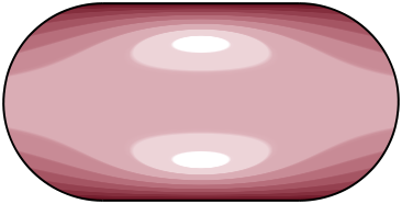 mira zkresleni